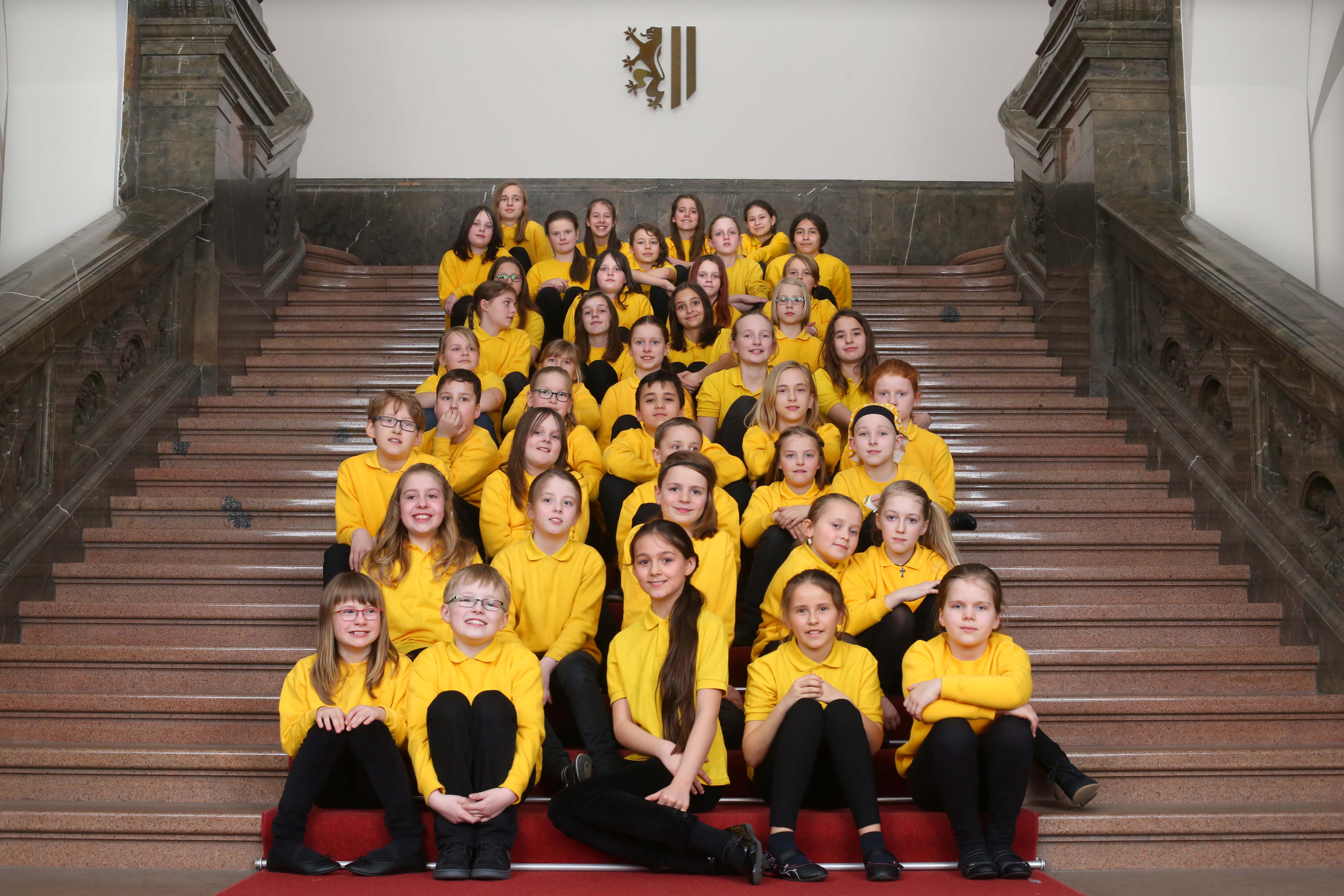 Schola Cantorum Leipzig Kinderchor, Neues Rathaus Leipzig, Foto: Gert Mothes.